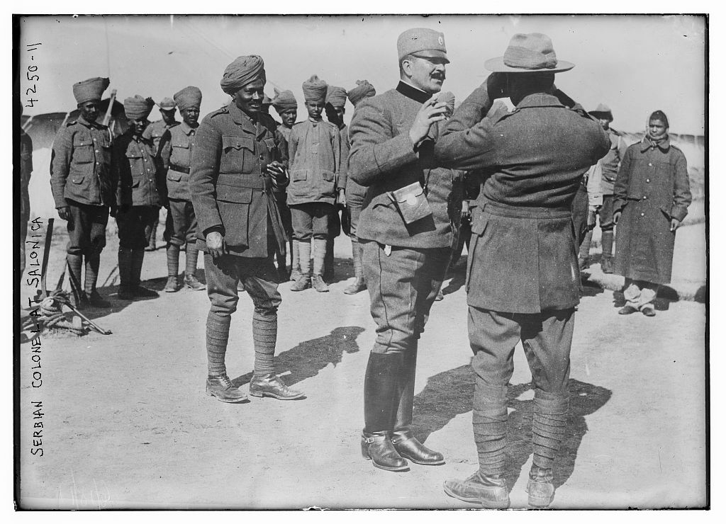 Coronel serbio en Salónica durante la Primera Guerra Mundial.